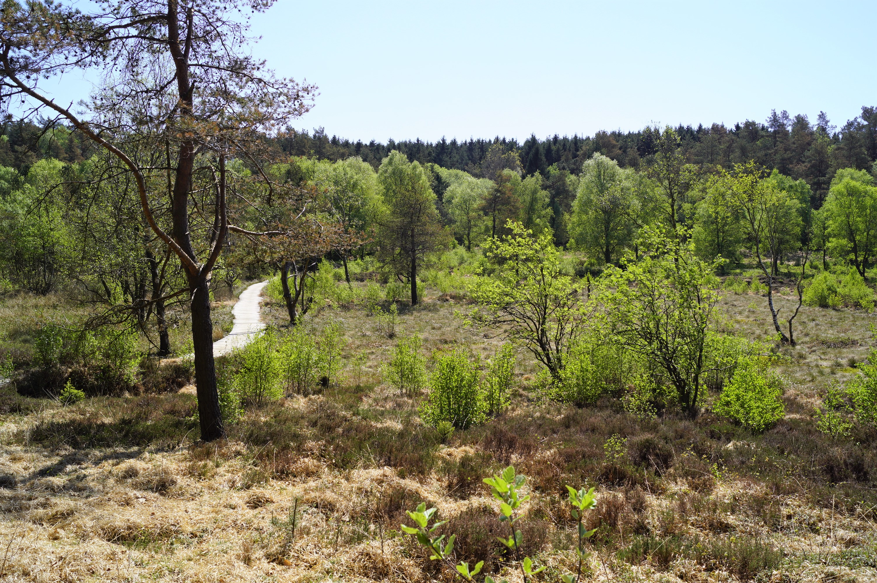 Bjældskovdal